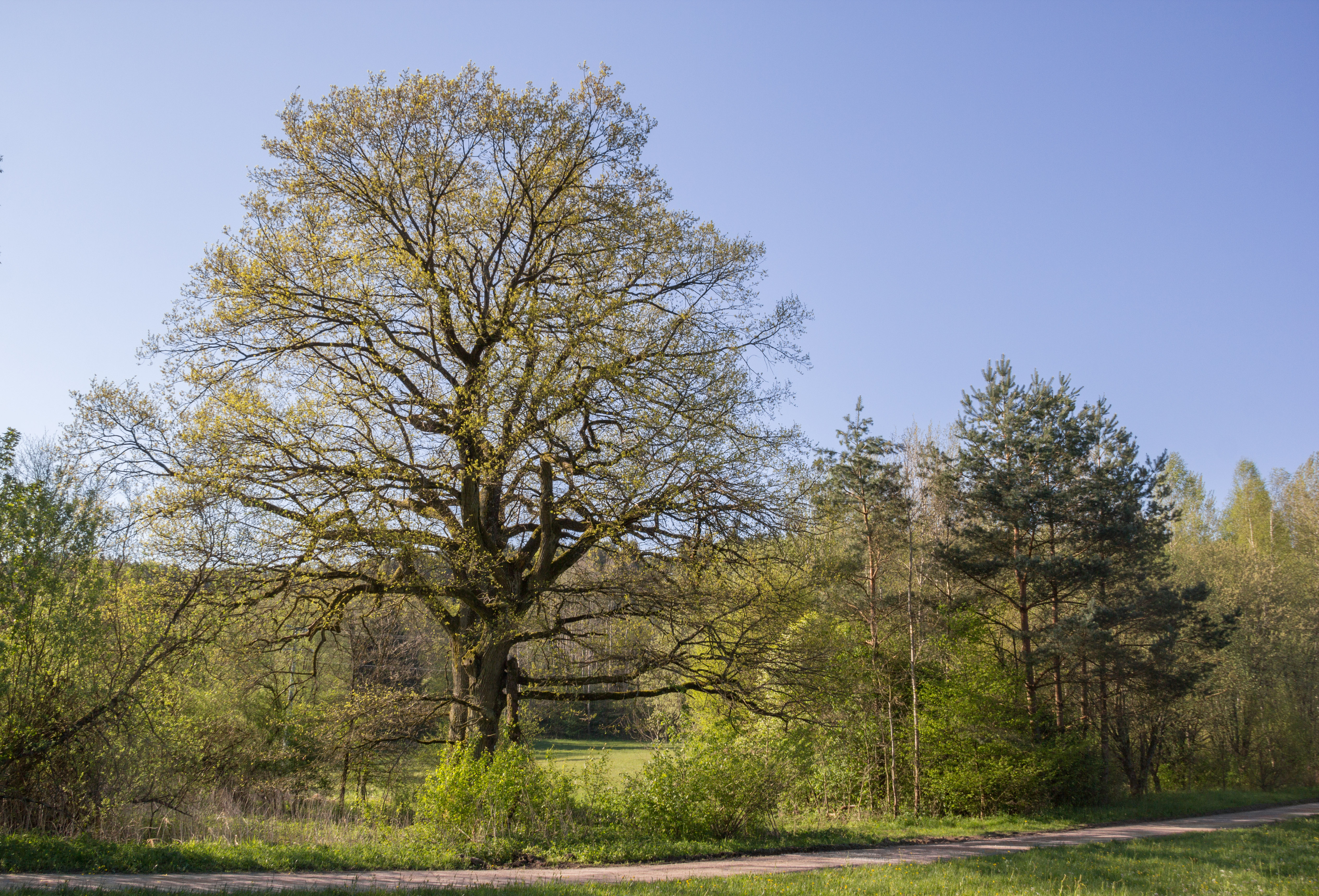 Eiche, Naturdenkmal (ND-04760), Schwarzenbruck, Schwarzachtal mit Nebentälern, Schwarzenbruck